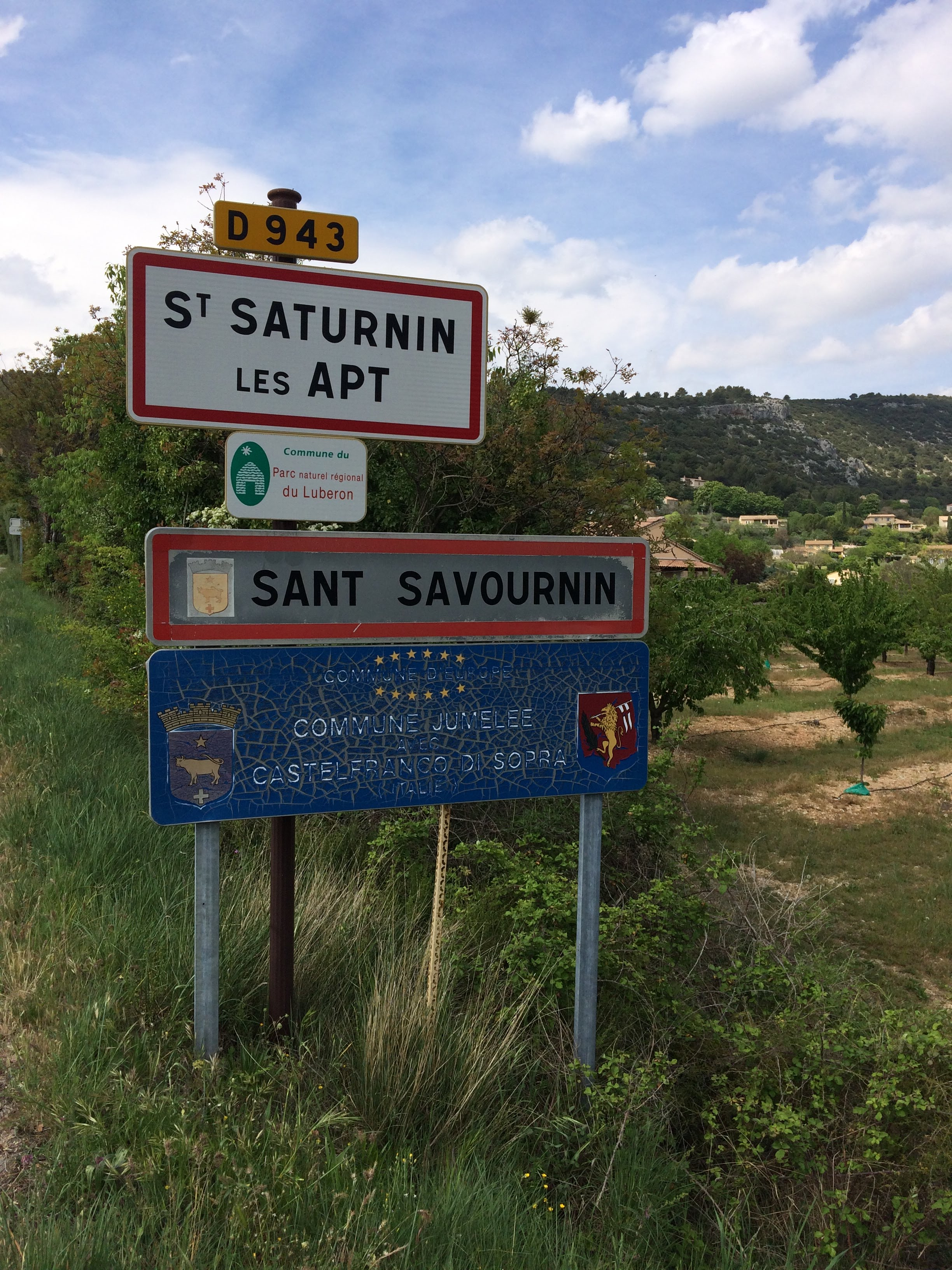 Panèl d'intrada de Sant Savornin d'Ate.